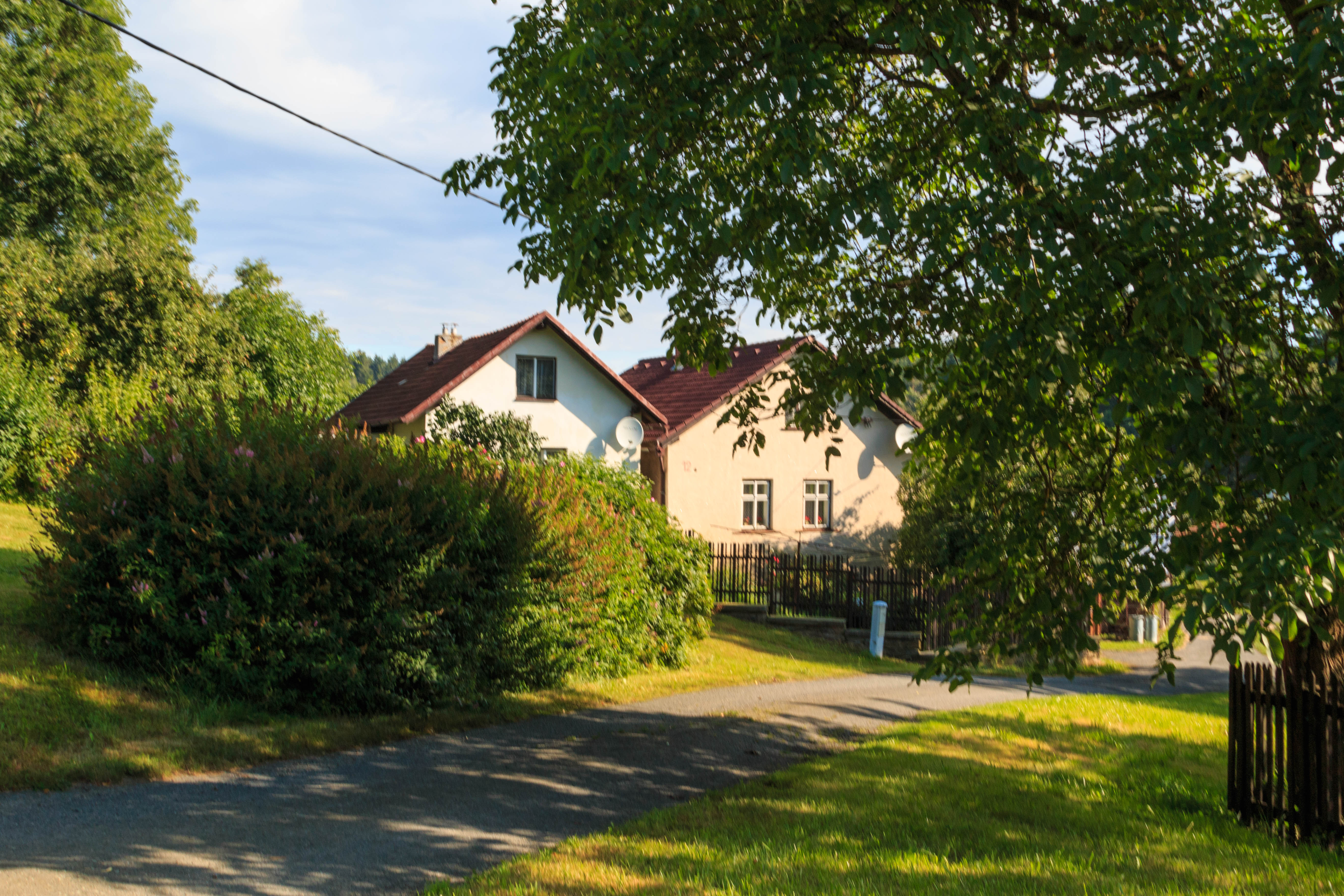 Lysá čp. 12